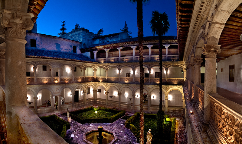 Monasterio de San Bartolomé de Lupiana, Guadalajara.